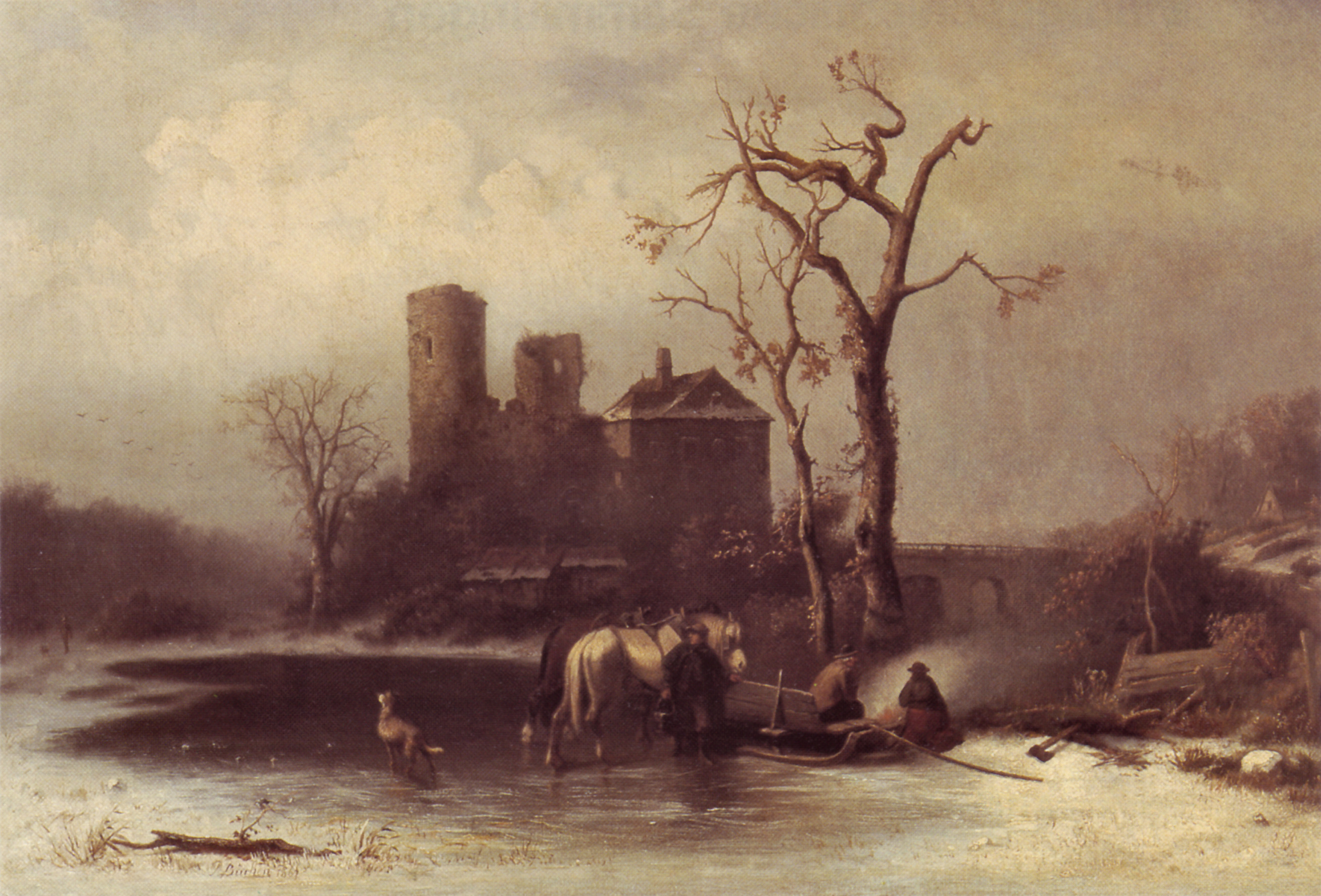 Ölgemälde der Burg Frankenberg in Aachen